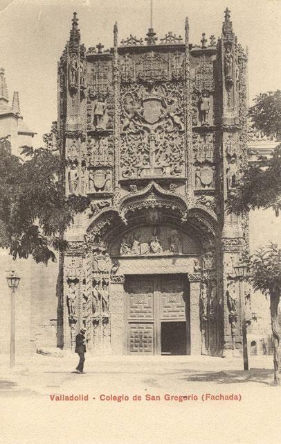 Colegio de San Gregorio. Fachada - Valladolid - Union Postale Universelle - Tarjeta postal 140 x 90 B/N